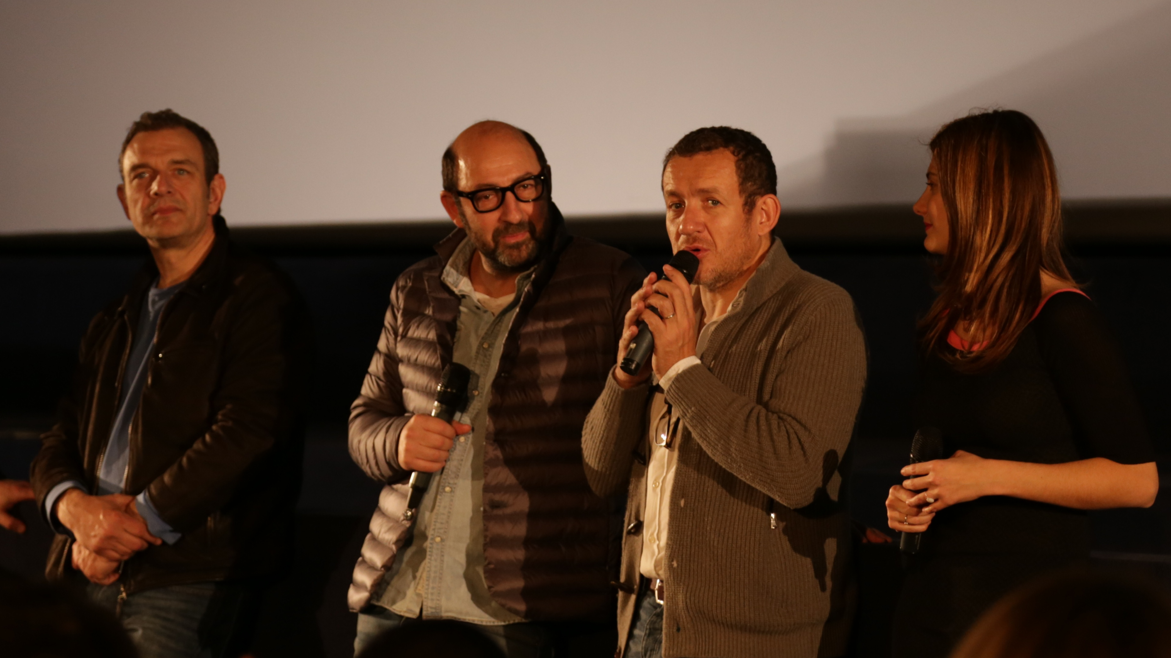 Avant première du film supercondriaque le 14/02/2014 à Lyon